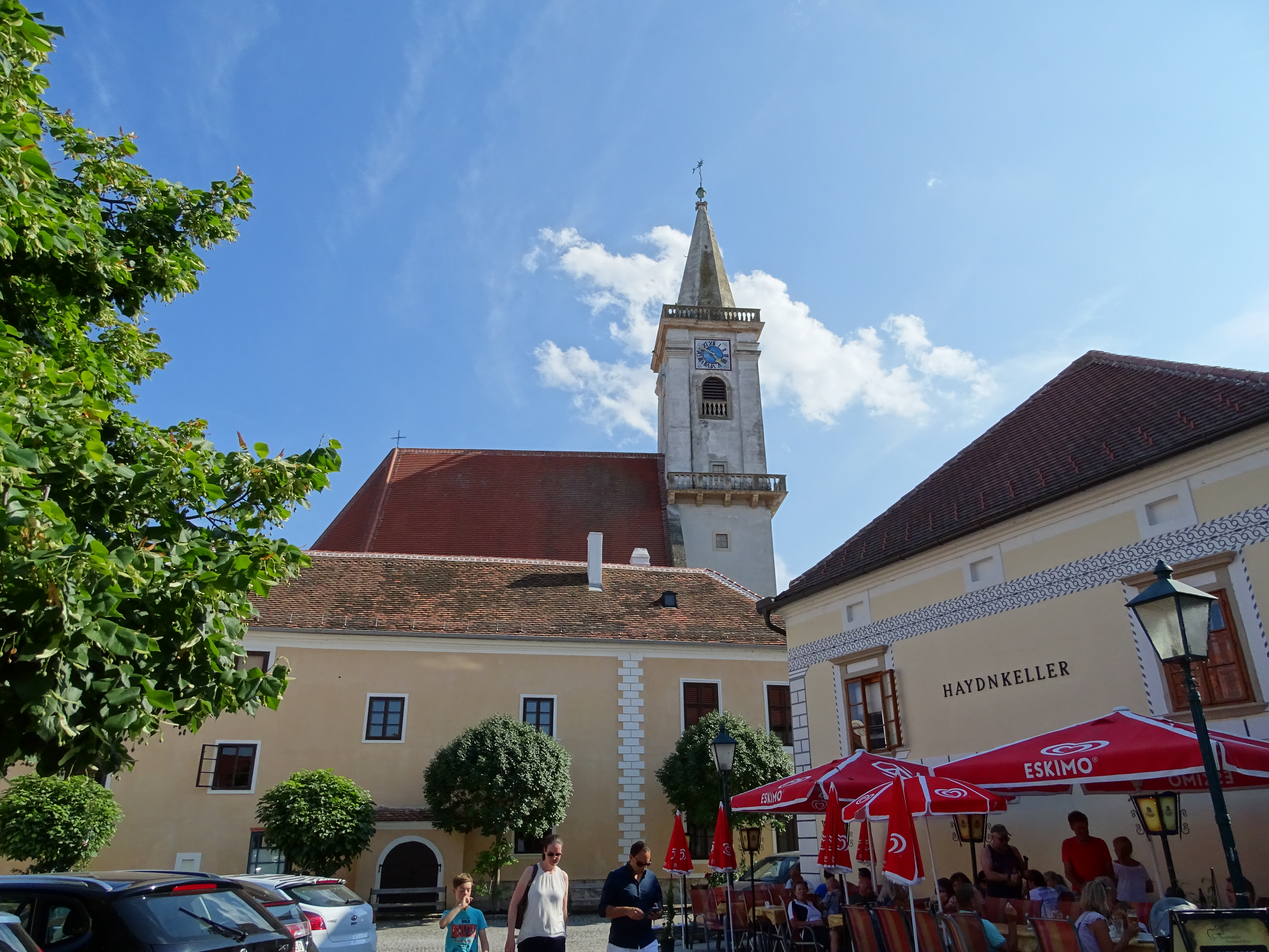 Die katholische Pfarrkirche von Rust am See im Burgenland